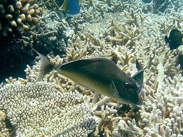 Naso brachycentron en Mirihi, Malidivas